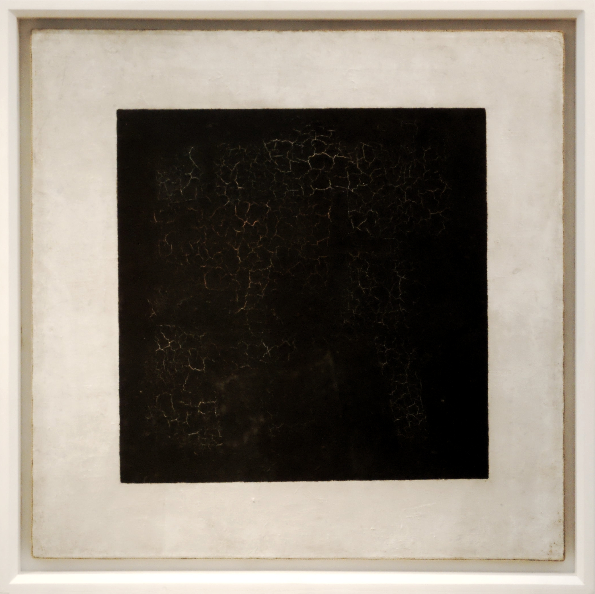 Kasimir Malewitschs Schwarzes Quadrat von 1915, wie es in der Tretjakow Galerie in Moskau ausgestellt wird